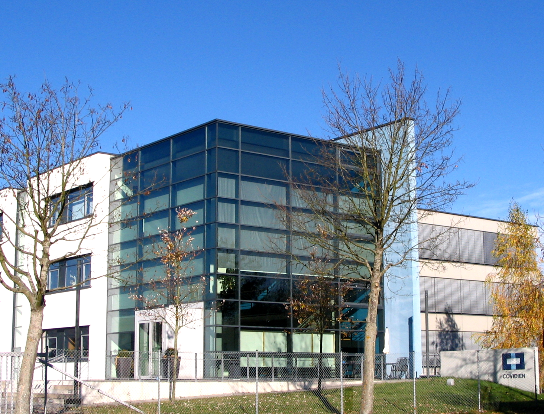 Covidien Deutschland GmbH, Verwaltungssitz Neustadt an der Donau, Landkreis Kelheim, Niederbayern